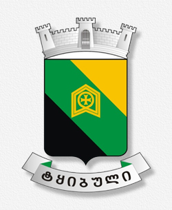 ტყიბულის მუნიციპალიტეტის გერბი